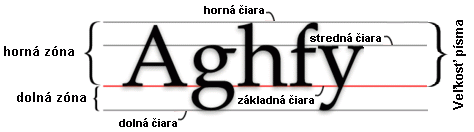 Slovenská verzia Image:Vertical typographic terms.png